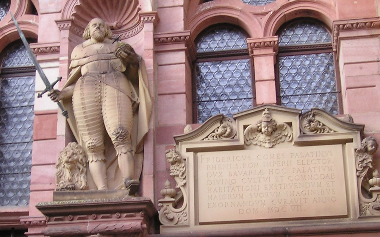 Kurfürst Friedrich IV. Statue der Ahnengalerie am Friedrichsbau des Heidelberger Schlosses. Bauinschrift. Fridericvs comes palatinvs rheni s[acri] rom[ani] imperii elector dvx bavariæ hoc palativm divino cvltvi et commodae habitationi exstrvendvm et maiorvm svorvm imaginibvs exornandvm cvravit anno dom[ini] mdc. vii.